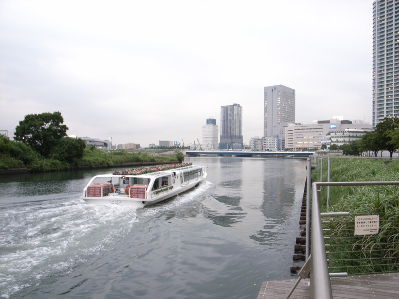 Seabus at Port Side Park, Yokohama.